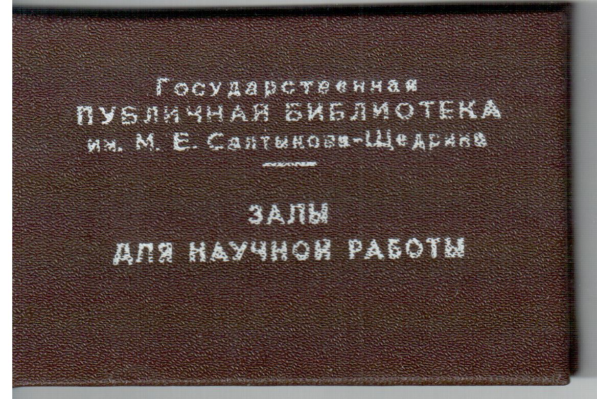 Обложка читательского билета Государственной Публичной библиотеки (Ленинград, 1991 г.)